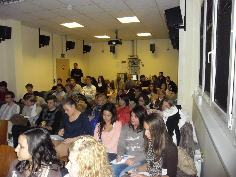 At4Hu Továbbtanulási szeminárium